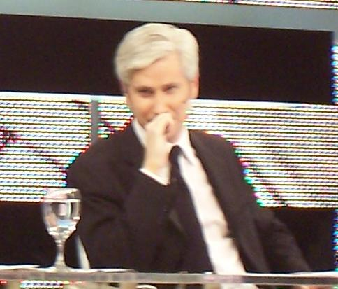 Juan Di Natale conduciendo Caiga Quien Caiga (Telefé-Argentina)